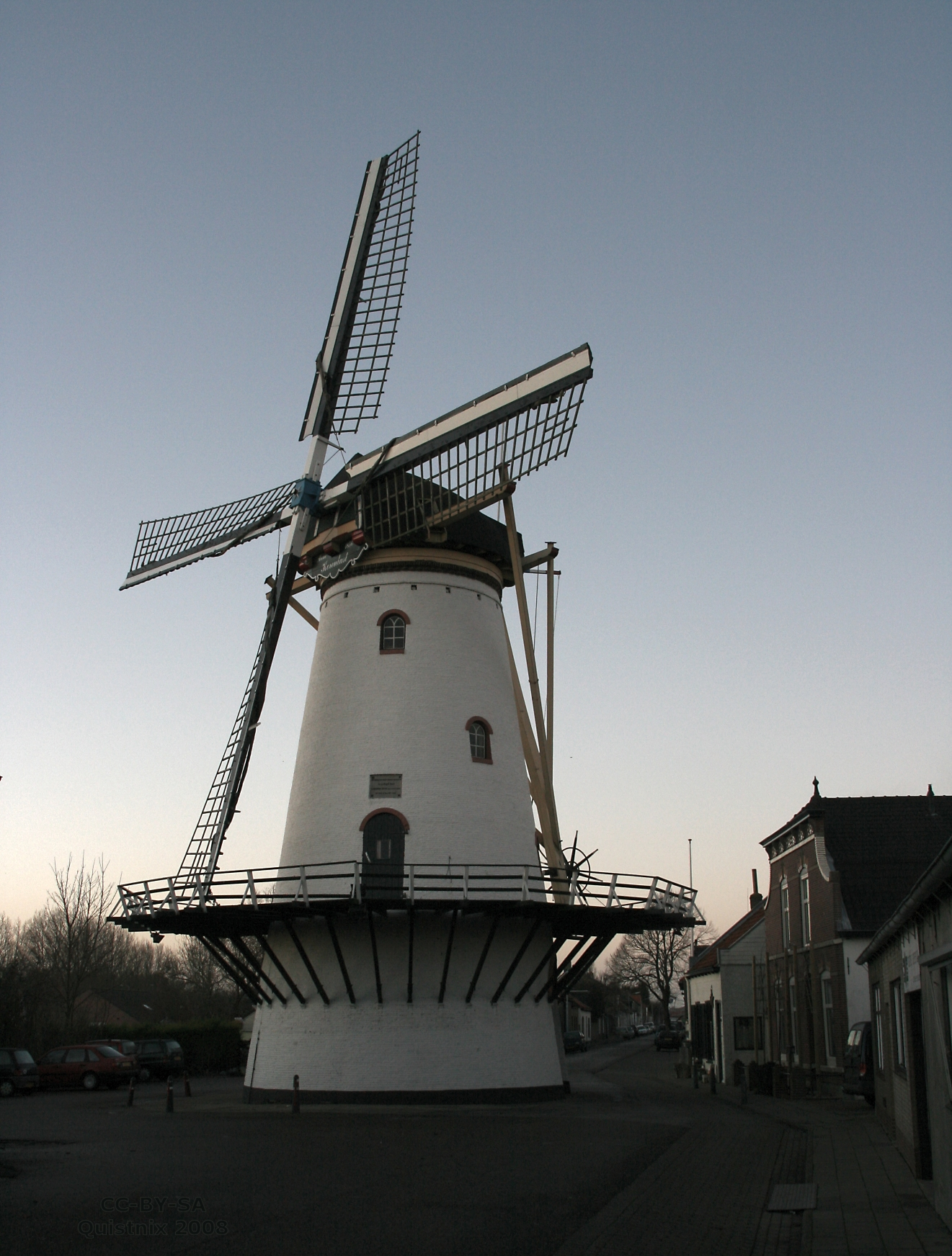 Stellendam, molen Korenlust, vanaf de zuidkant gefotografeerd